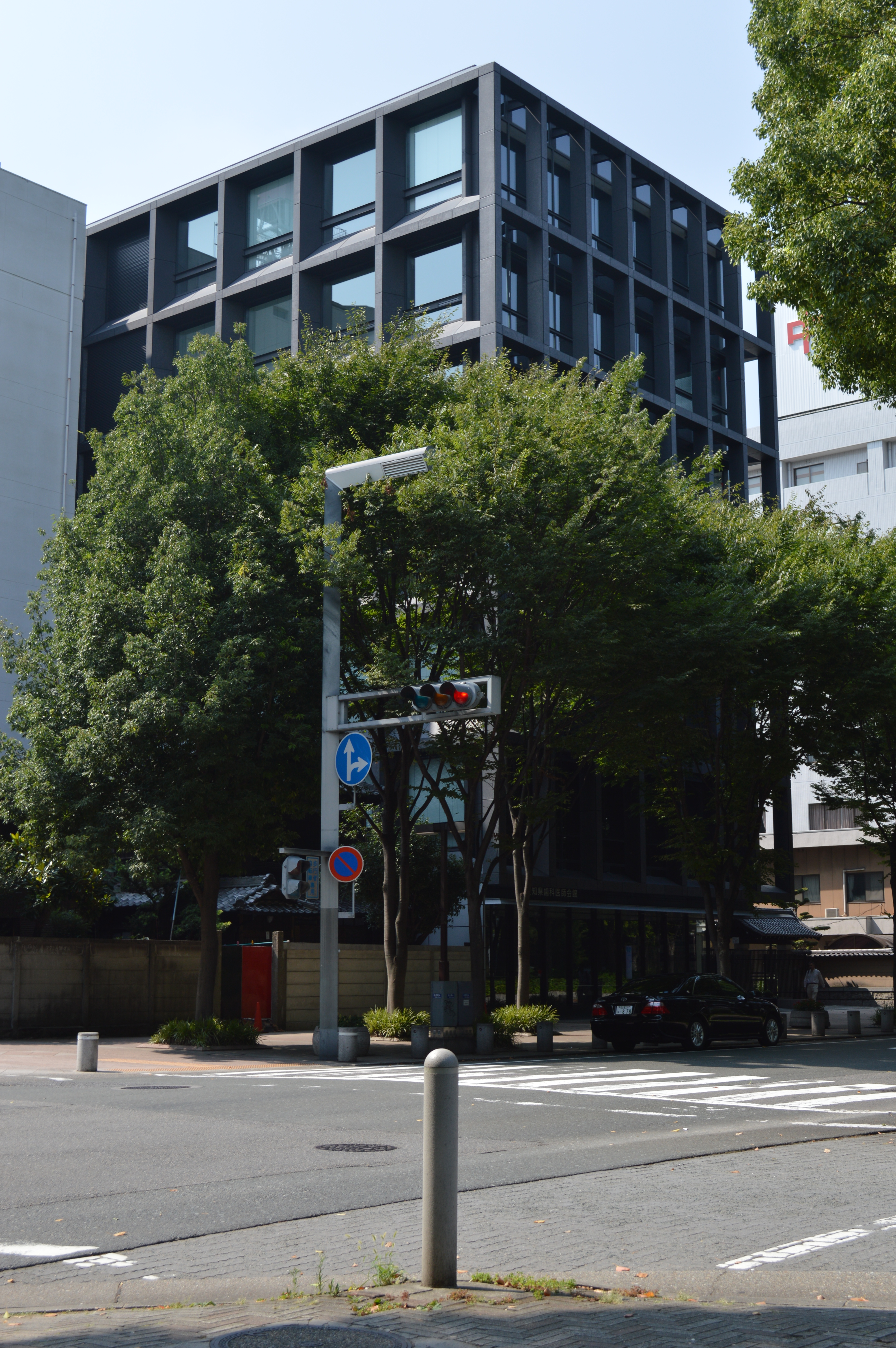 愛知県名古屋市中区にある愛知県歯科医師会のビル、1階には歯の博物館がある